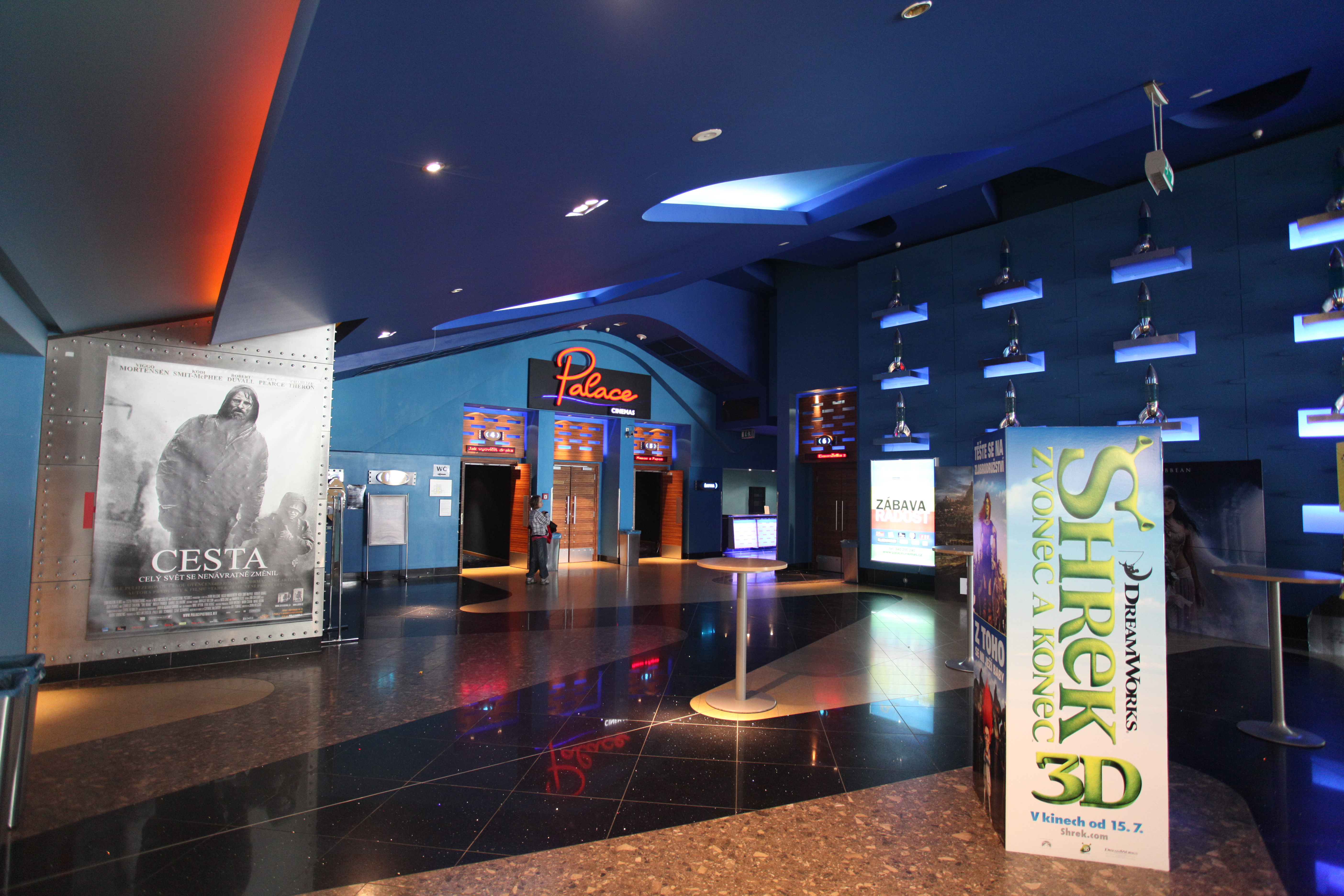 Česky: Multikino Palace Cinemas Velký Špalíček v Brně